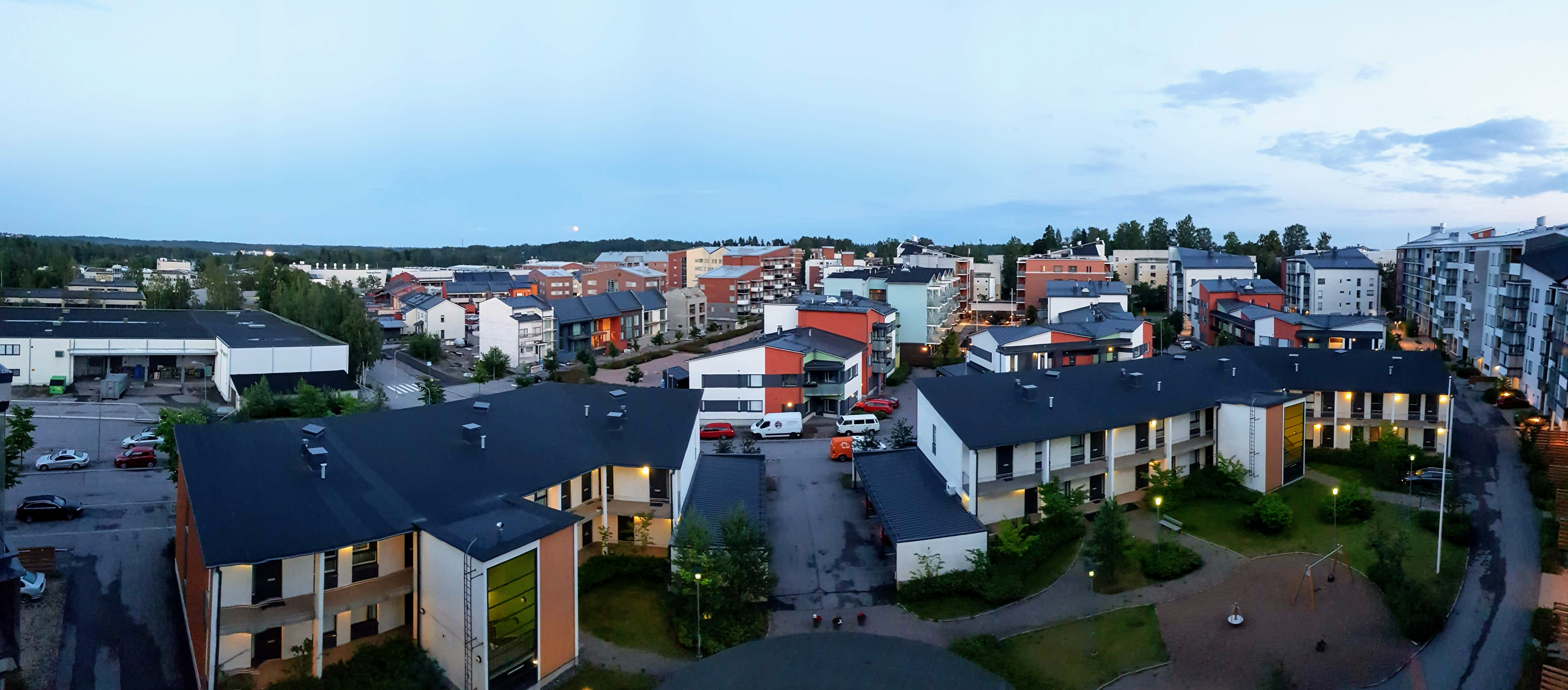 Ormuspellon asuinalue Malminkaarelta etelään päin